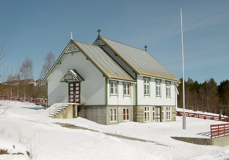 Gjemnes and the Osmarka kapell